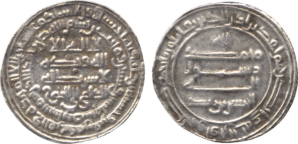 ISLAMIC COINS.al-Hasan b. Zayd (250-270h), Silver Dirham, Jurjan 269h, 4.75g (Album 1523). Very fine and rare.